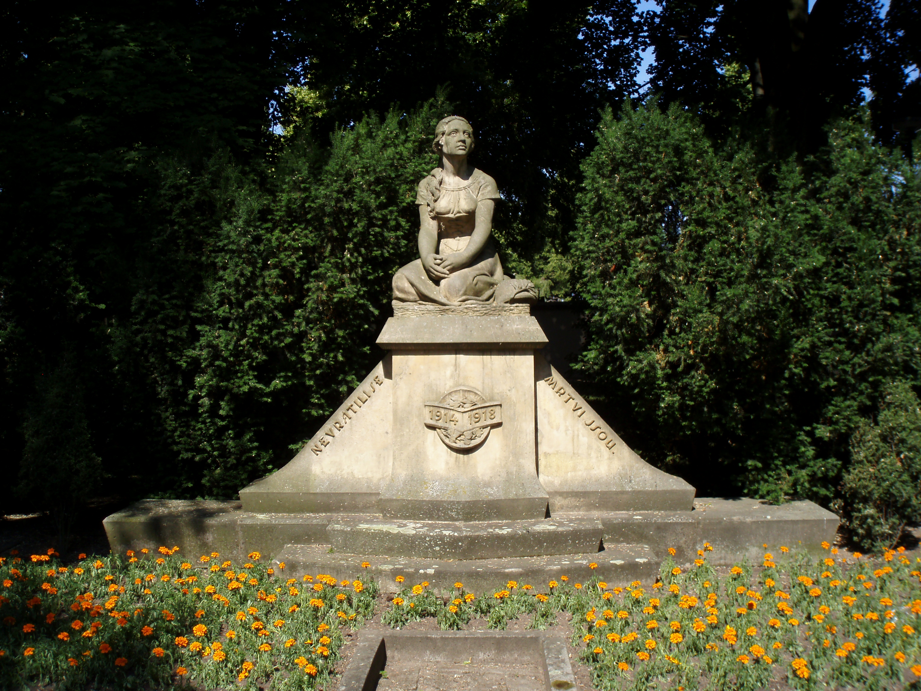 Pomník padlým na Pouchově